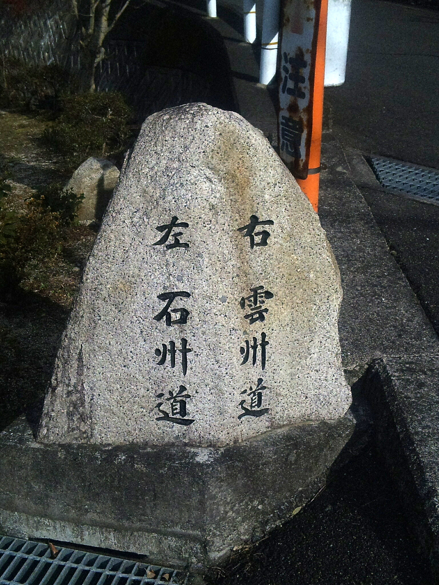 旧石州街道「荒谷往還」の道標。 旧石州街道と旧雲州街道が分岐する。 （広島県府中市荒谷町別両路）